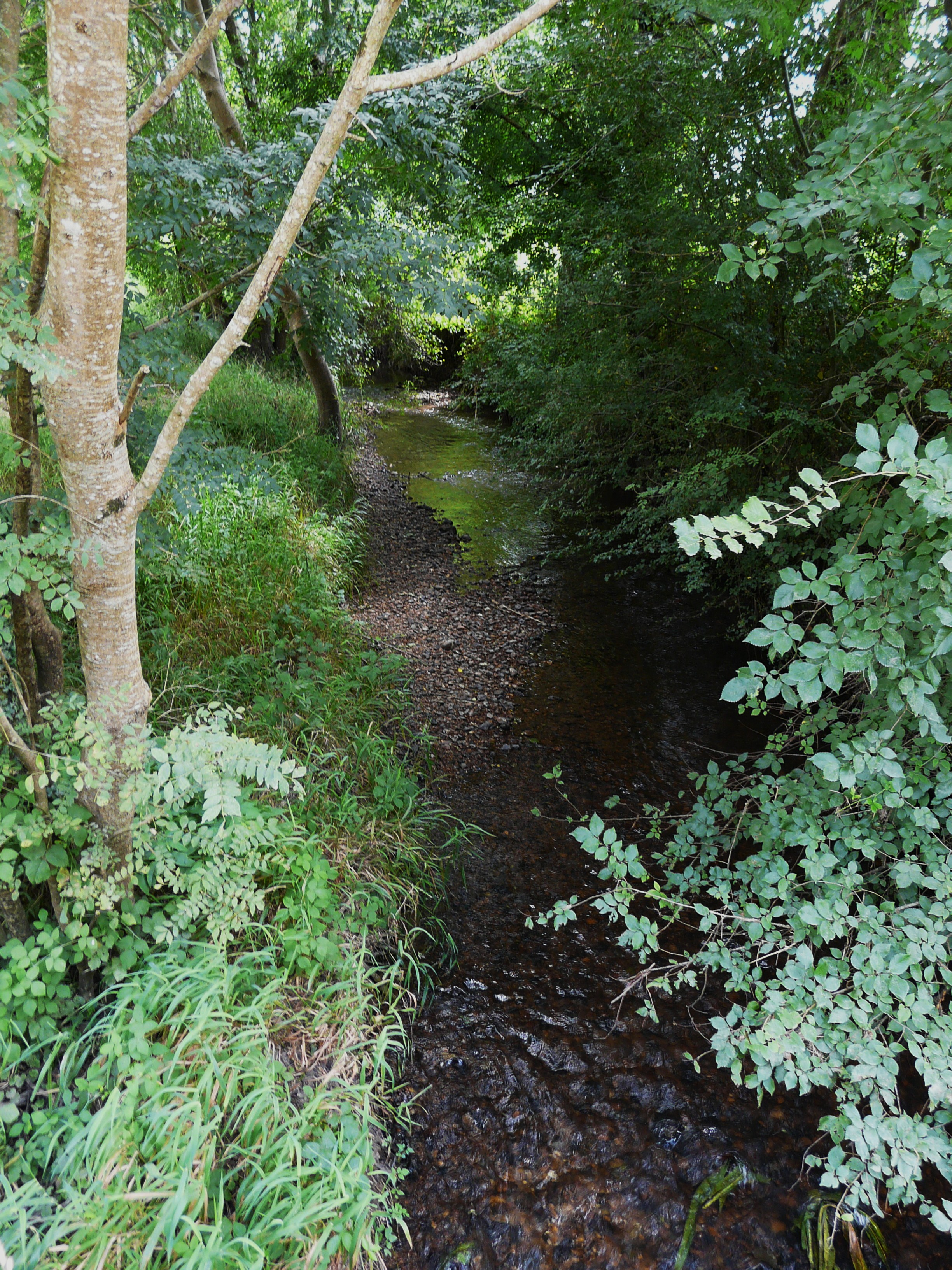 Le ruisseau la Beauronne à Chandos, Saint-Médard-de-Mussidan, Dordogne, France